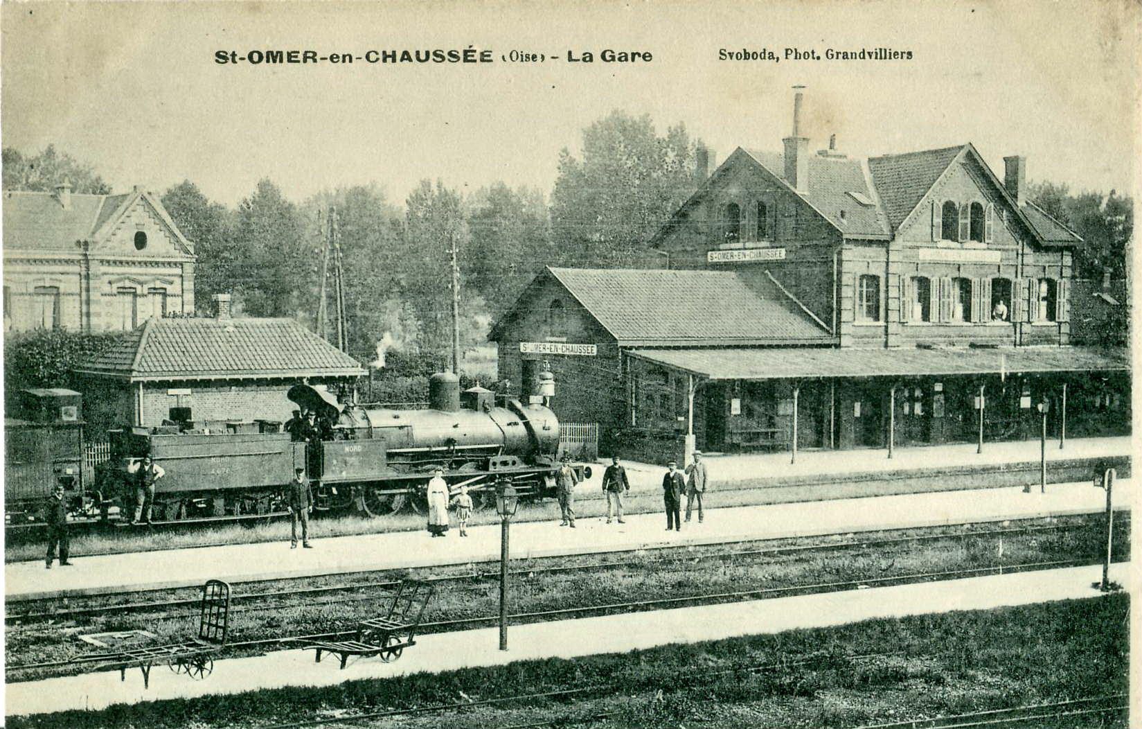 Carte postale ancienne éditée par Svoboda La Gare de Saint-Omer-en-Chaussée (Oise) au début du XXe siècle